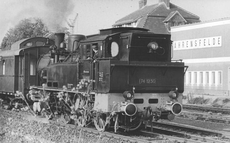 Dampflok 74 1230 (BR 74) ADN-ZB Uhlemann 17.8.86 Berlin: Solidaritätsaktion des Berliner Rundfunks - Unter dem Titel "Historische Straßenbekanntschaften" organisiert der Berliner Rundfunk eine Solidaritätsaktion mit mehreren Attraktionen. Für viele interessierte Eisenbahnfahrer wurde die Fahrt mit dem Traditionszug von Ahrensfelde nach Tiefensee zu einem besonderen Erlebnis.